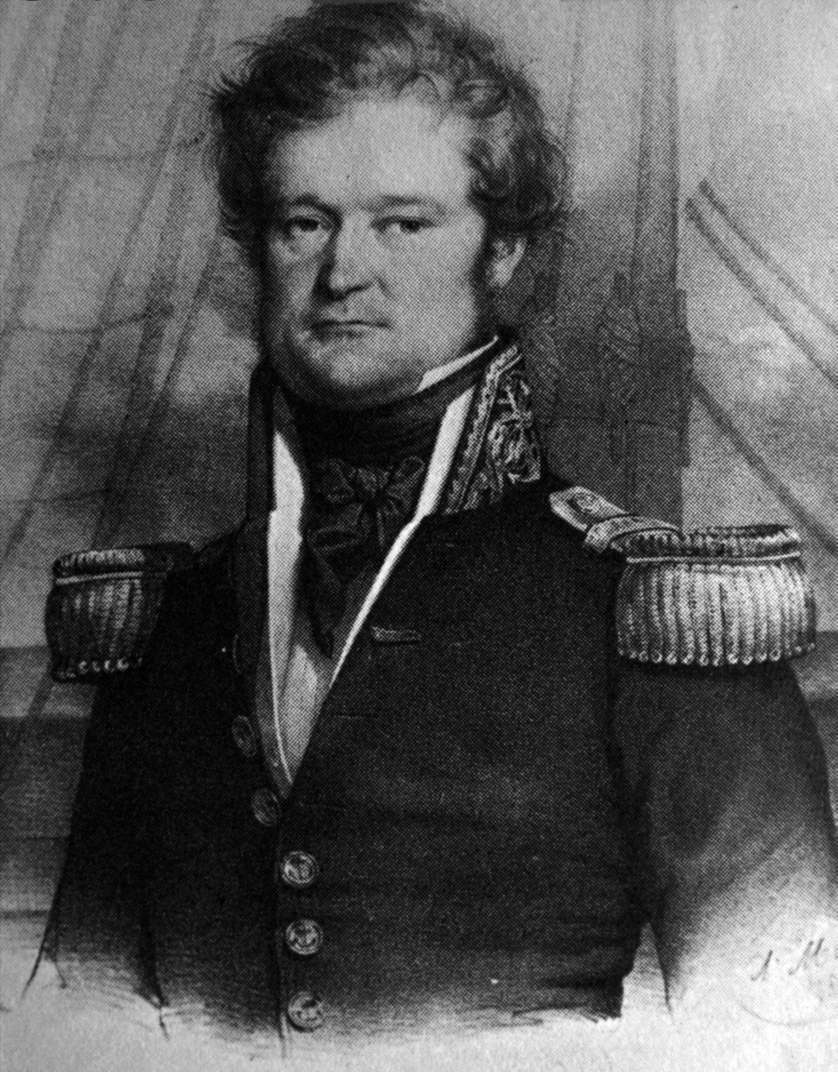 Jules Dumont d'Urville (1790-1842)